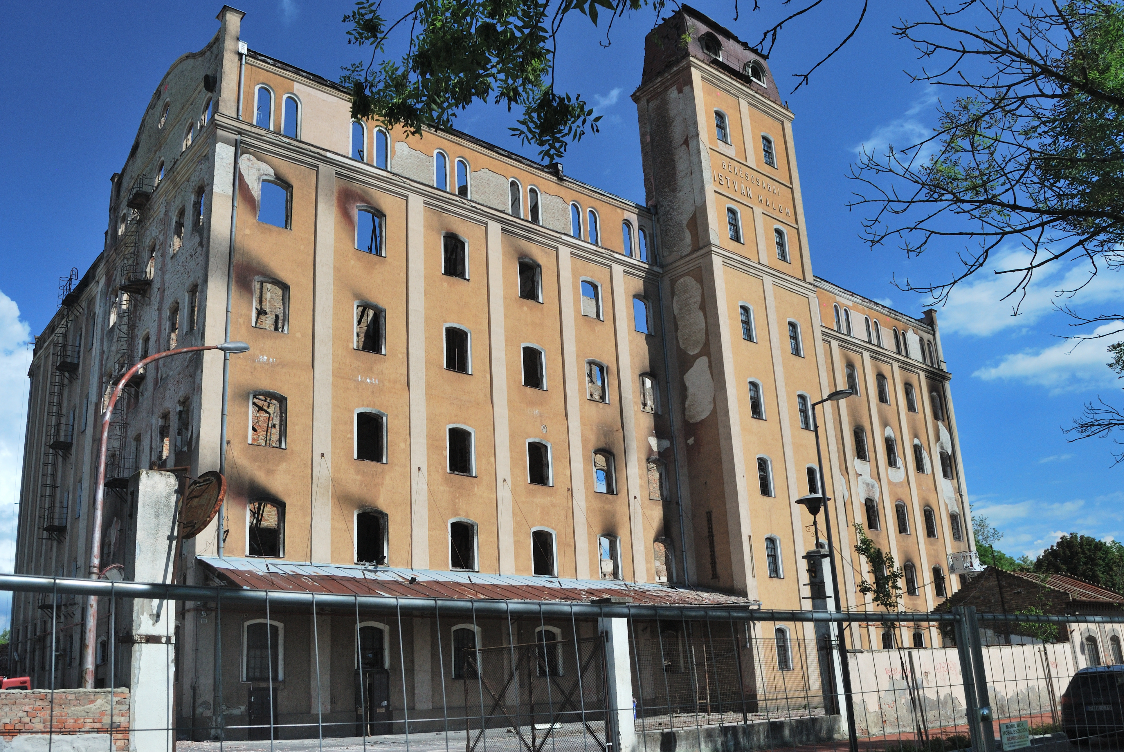 A leégett István-malom Békéscsabán